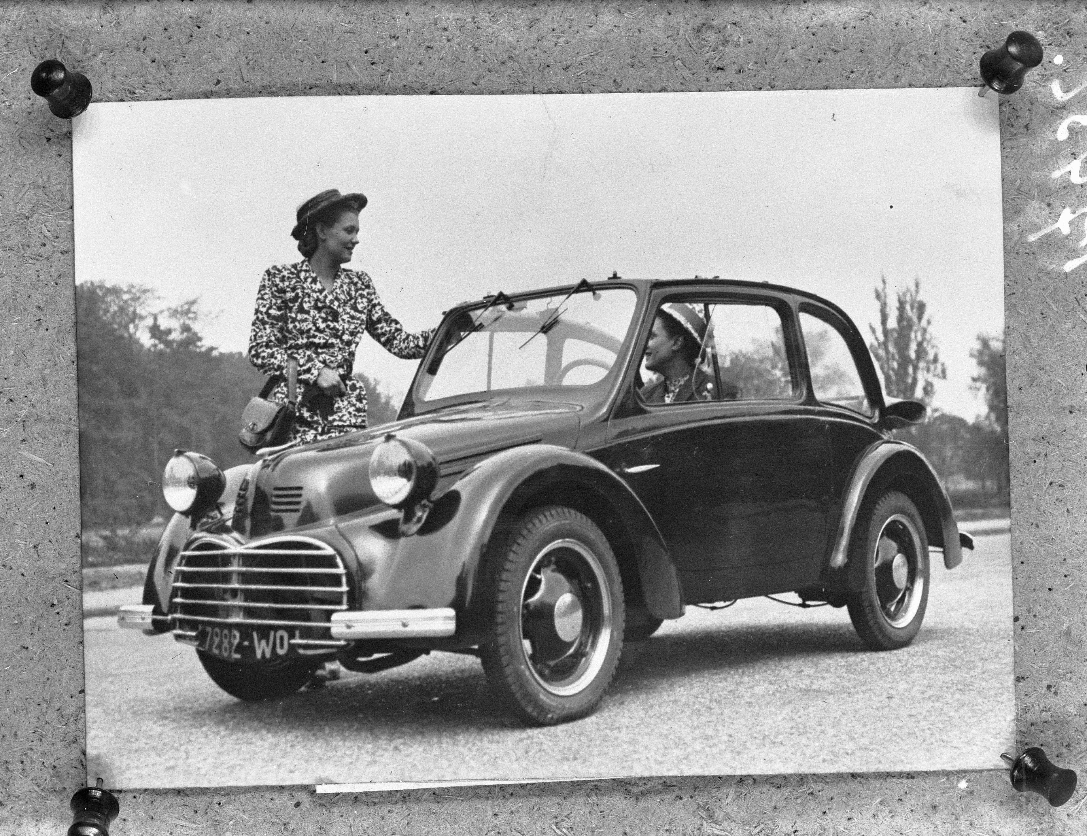 Collectie / Archief : Fotocollectie Anefo Reportage / Serie : [ onbekend ] Beschrijving : 3e van de 4 prototypes van de AFG (Aluminium Français Grégoire), door ingénieur Grégoire gebouwd in 1942. De auto had een liggende tweecilinder motor en het koetswerk was gebouwd door Million-Guiet. Datum : 13 mei 1946 Locatie : Frankrijk Trefwoorden : auto's, prototypes Persoonsnaam : AFG, Grégoire, Million-Guiet Fotograaf : Agence France Presse (AFP) Auteursrechthebbende : Nationaal Archief Materiaalsoort : Glasnegatief Nummer archiefinventaris : bekijk toegang 2.24.01.09 Bestanddeelnummer : 901-7432